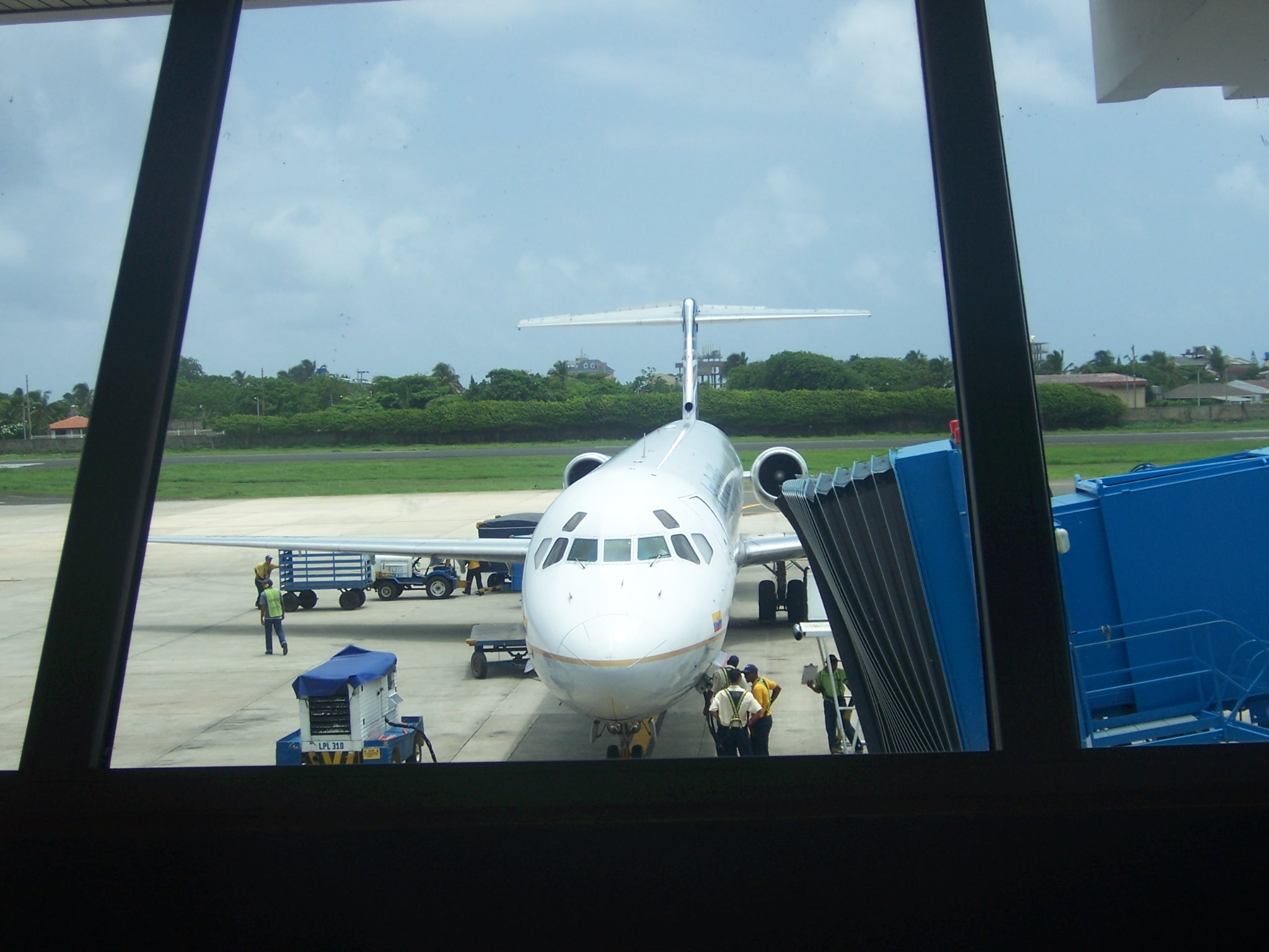 sala de espera en el aeropuerto internacional gustavo rojas pinilla